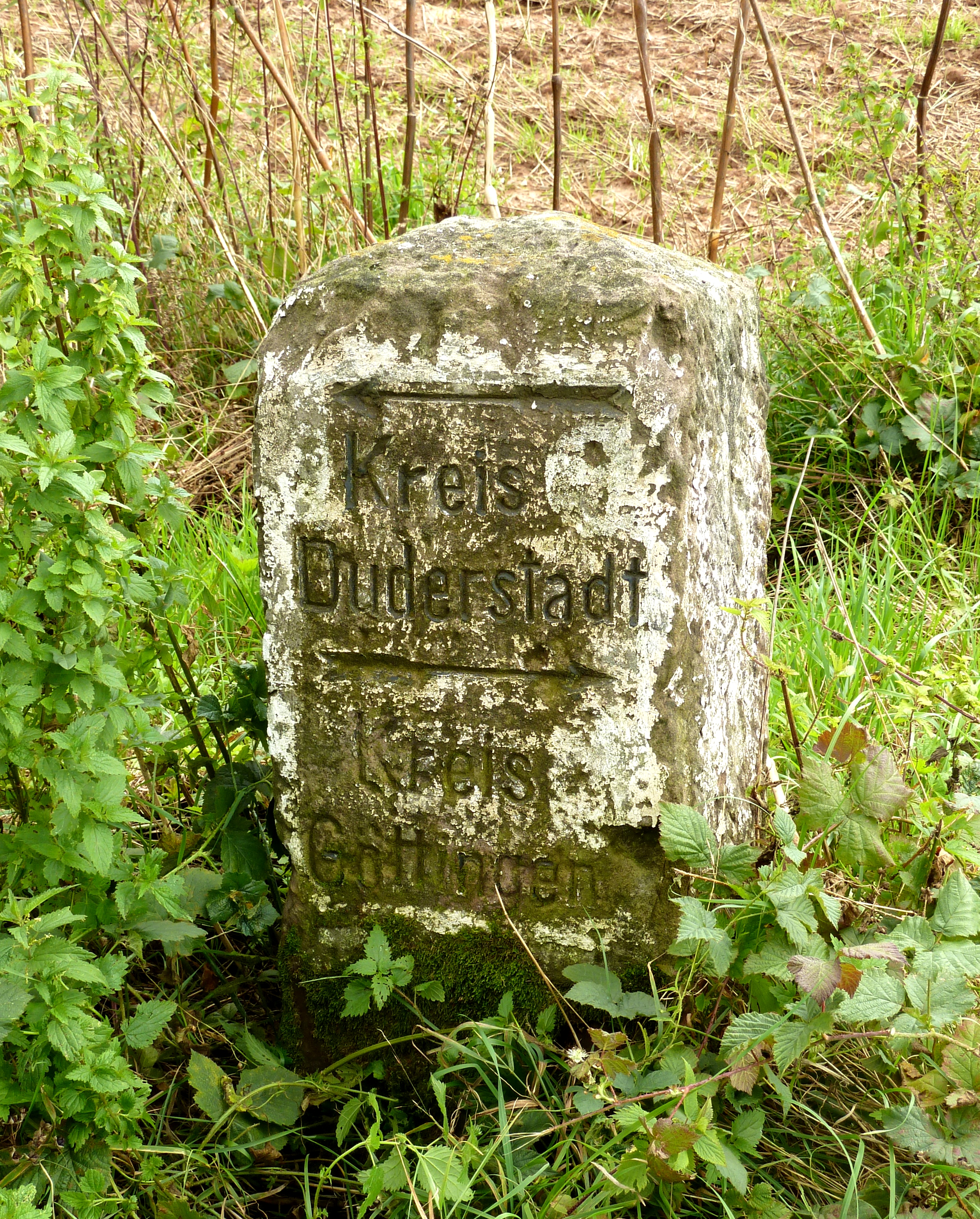 Grenzstein im Suhletal an der L574 an der ehemaligen Kreisgrenze Duderstadt/Göttingen bei Seulingen